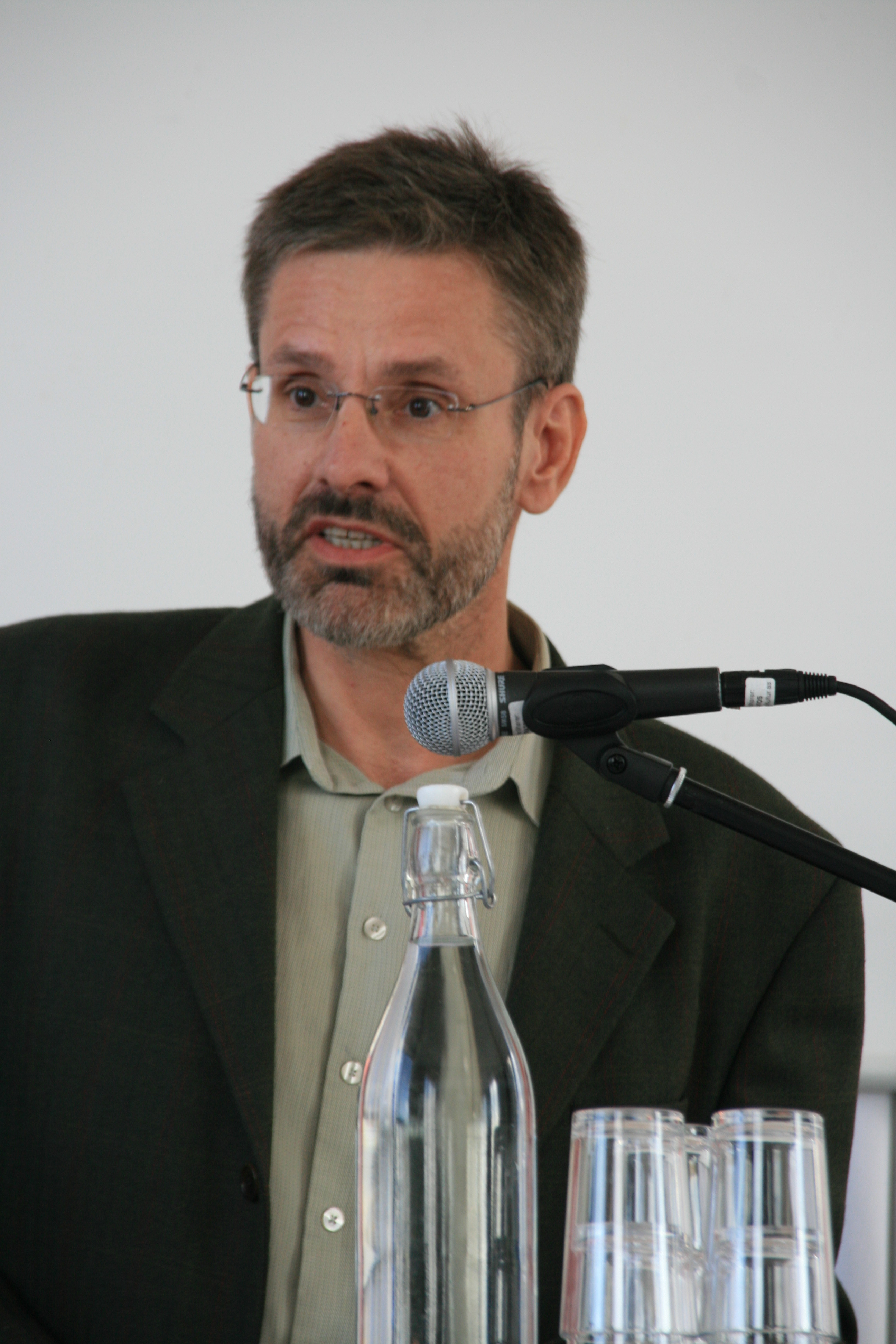 Andreas Føllesdal (født i Boston i USA i 1958) er en norsk filosof, og professor ved Universitetet i Oslo siden 1999.